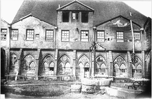 Galerie ouest du cloître et le bâtiment des convers. La galerie est murée, le bâtiment est surélevé avec un deuxième étage sous un pignon central. La porcelaine sèche devant la galerie.